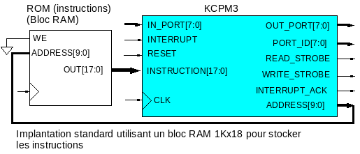 Utilisation la plus simple du PicoBlaze : le composant KCPM3 et une mémoire.